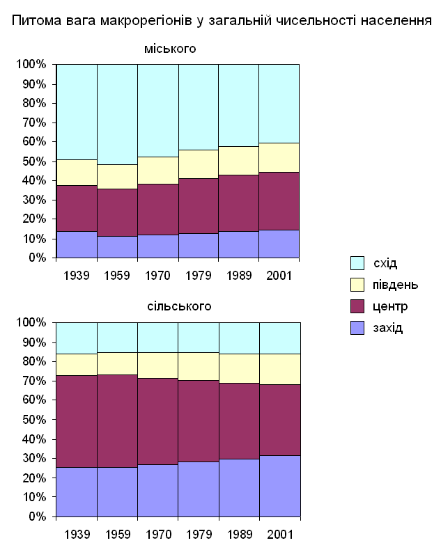 Share of Ukrainian geographical regions in urban and rural population since 1939